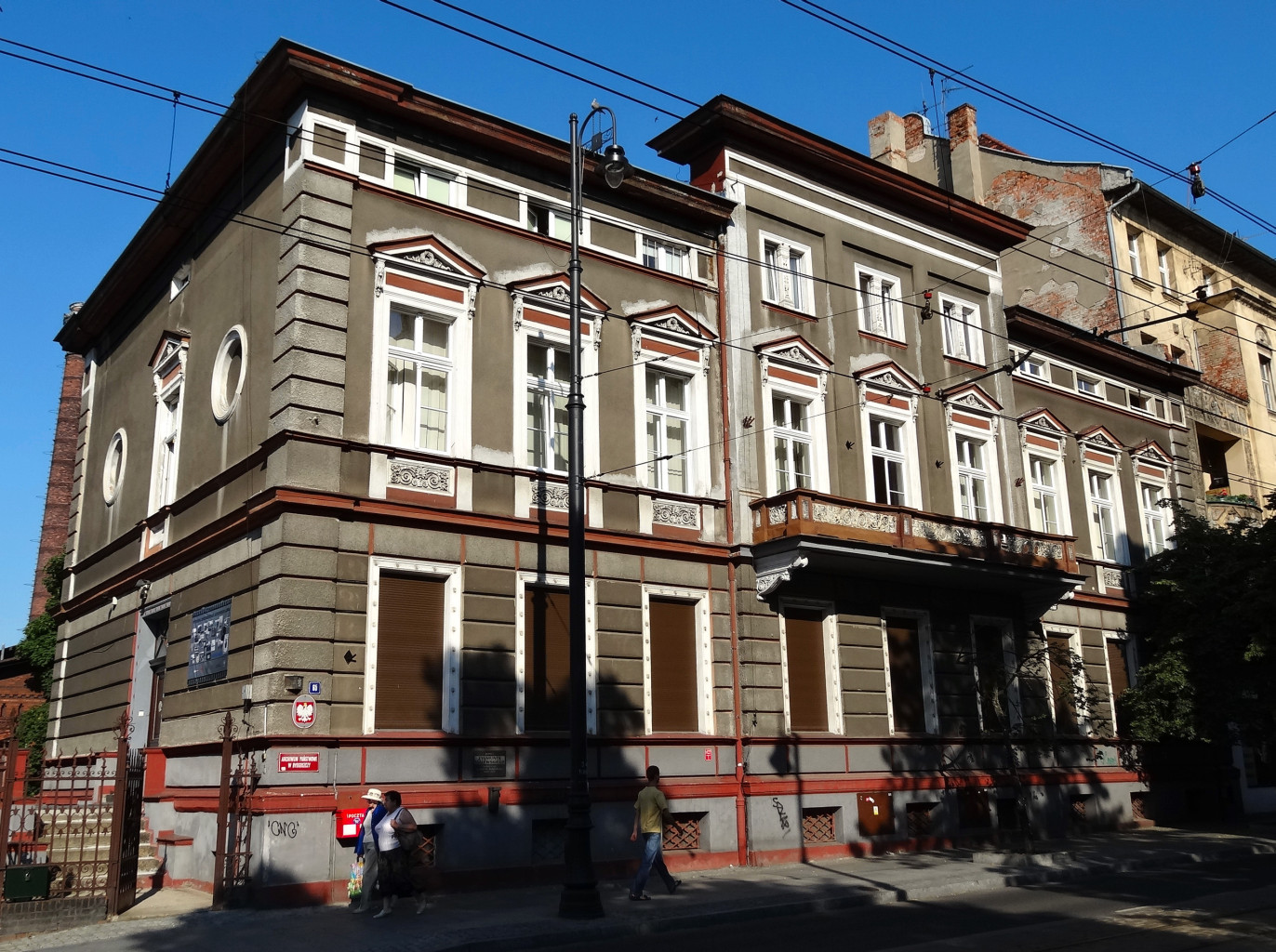 Archiwum Państwowe ul. Dworcowa 65 w Bydgoszczy